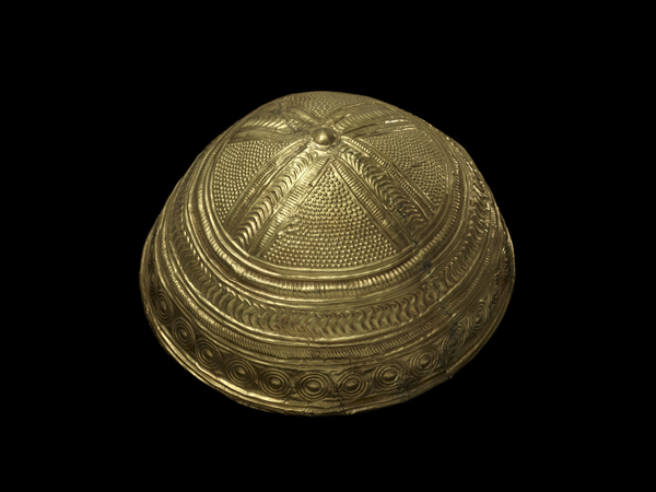 Cuenco de Axtroki (Bronce Final). Número de inventario: 1973-77-1.